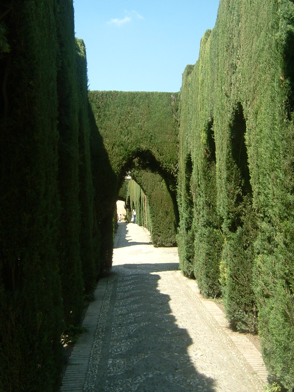 Alhambra, siepi nel giardino